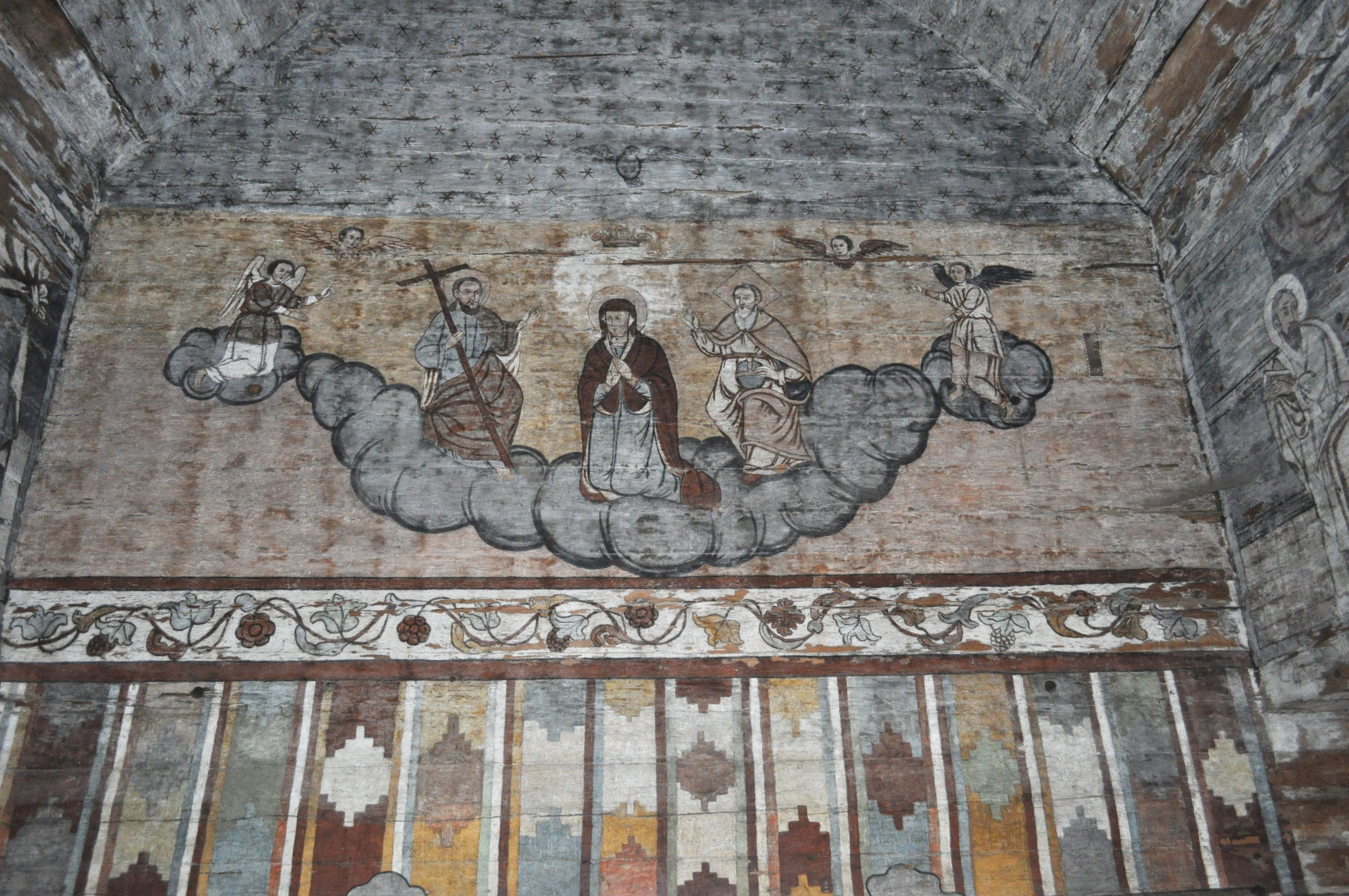 Biserica de lemn "Sfântul Nicolae", sat BOGDAN VODĂ